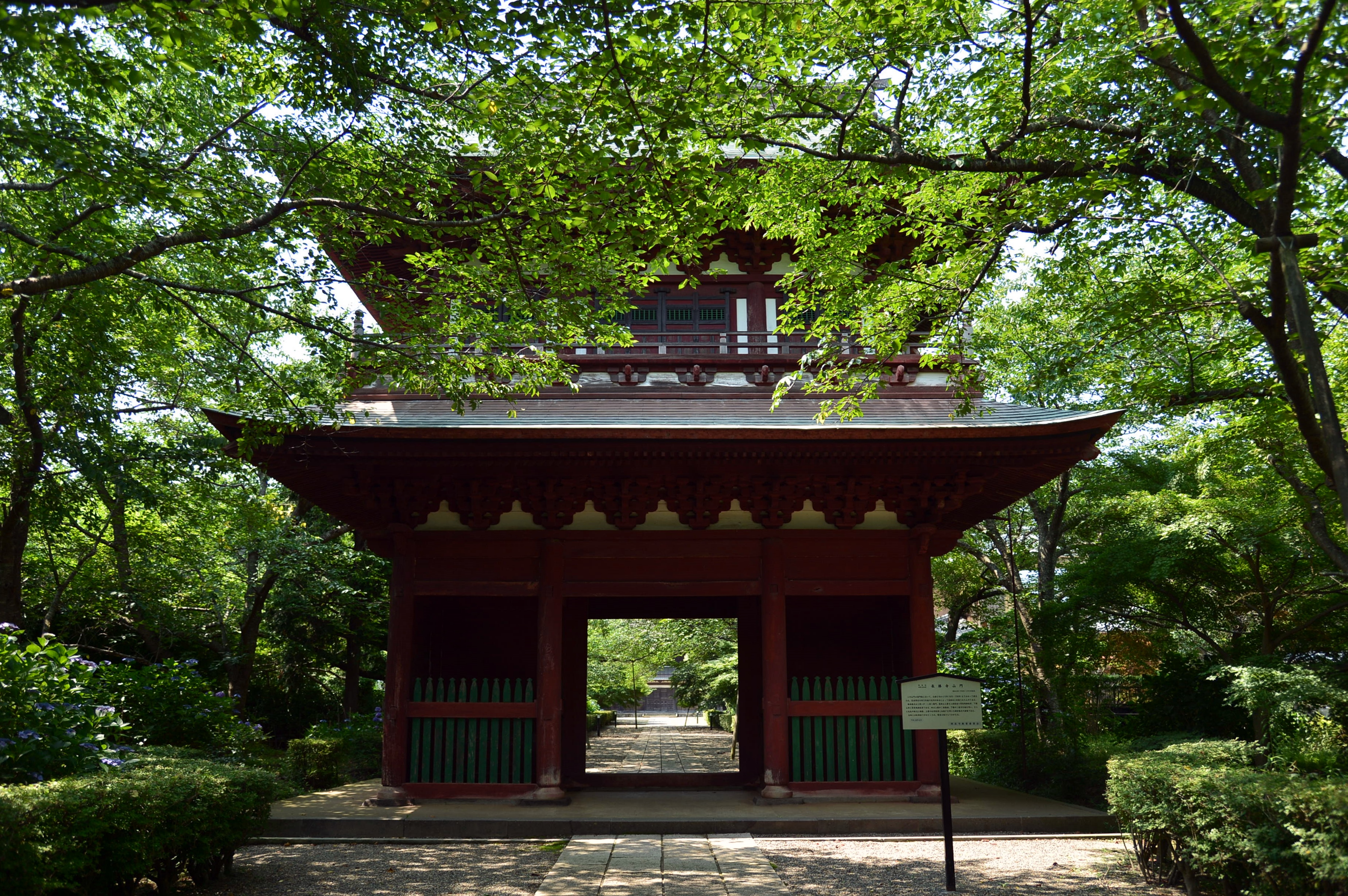 長勝寺山門（茨城県潮来市）